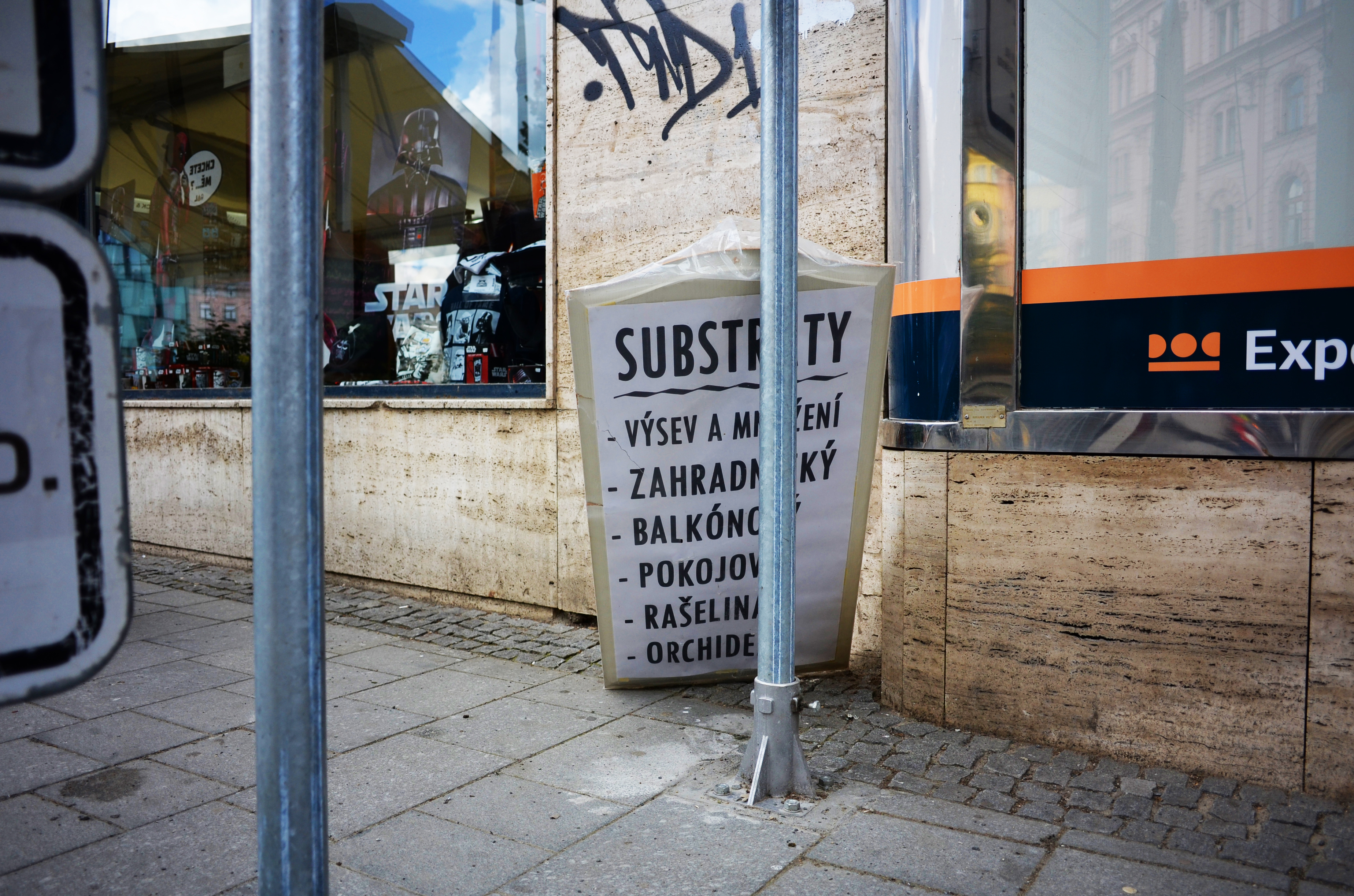 Ilegálně umístěné reklamní bannery jsou často nesprávně uchycené a při větrném počasí mohou ohrožovat chodce. Ilegální reklama snižuje hodnotu legálních reklamních ploch. Brno, 2016